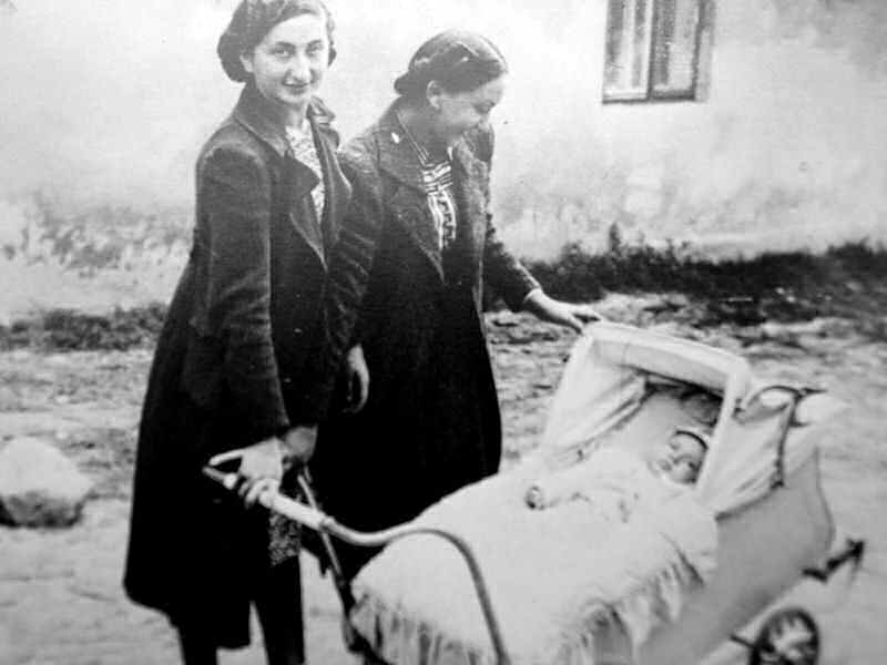 Rodzina żydowska z Szydłowca ok. 1900